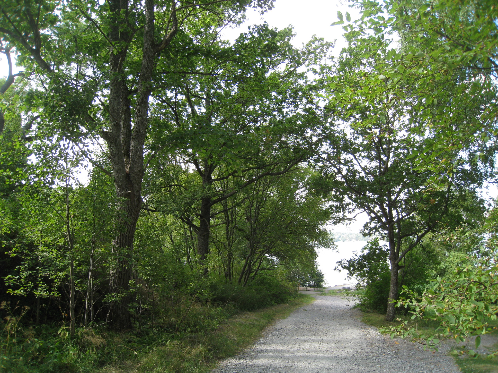 Sandviks gård i Görvälns naturreservat i Järfälla kommun, Stockholms län. Vägen ner till badviken.